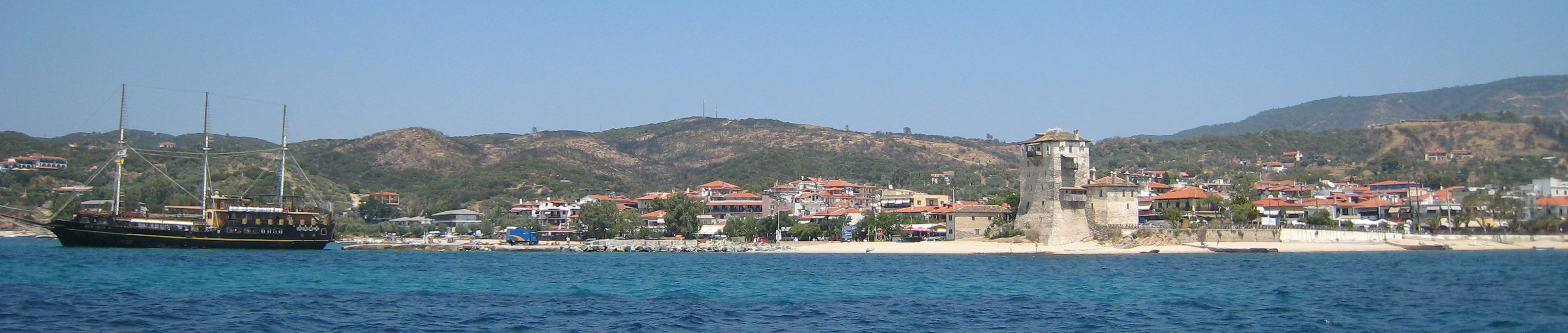 Vue d'Ouranoupoli depuis la mer.